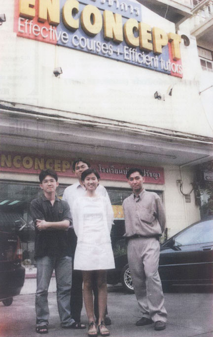 คณะผู้ก่อตั้งโรงเรียนกวดวิชาเอ็นคอนเส็ปท์ กับสาขาแรกย่านสะพานควาย